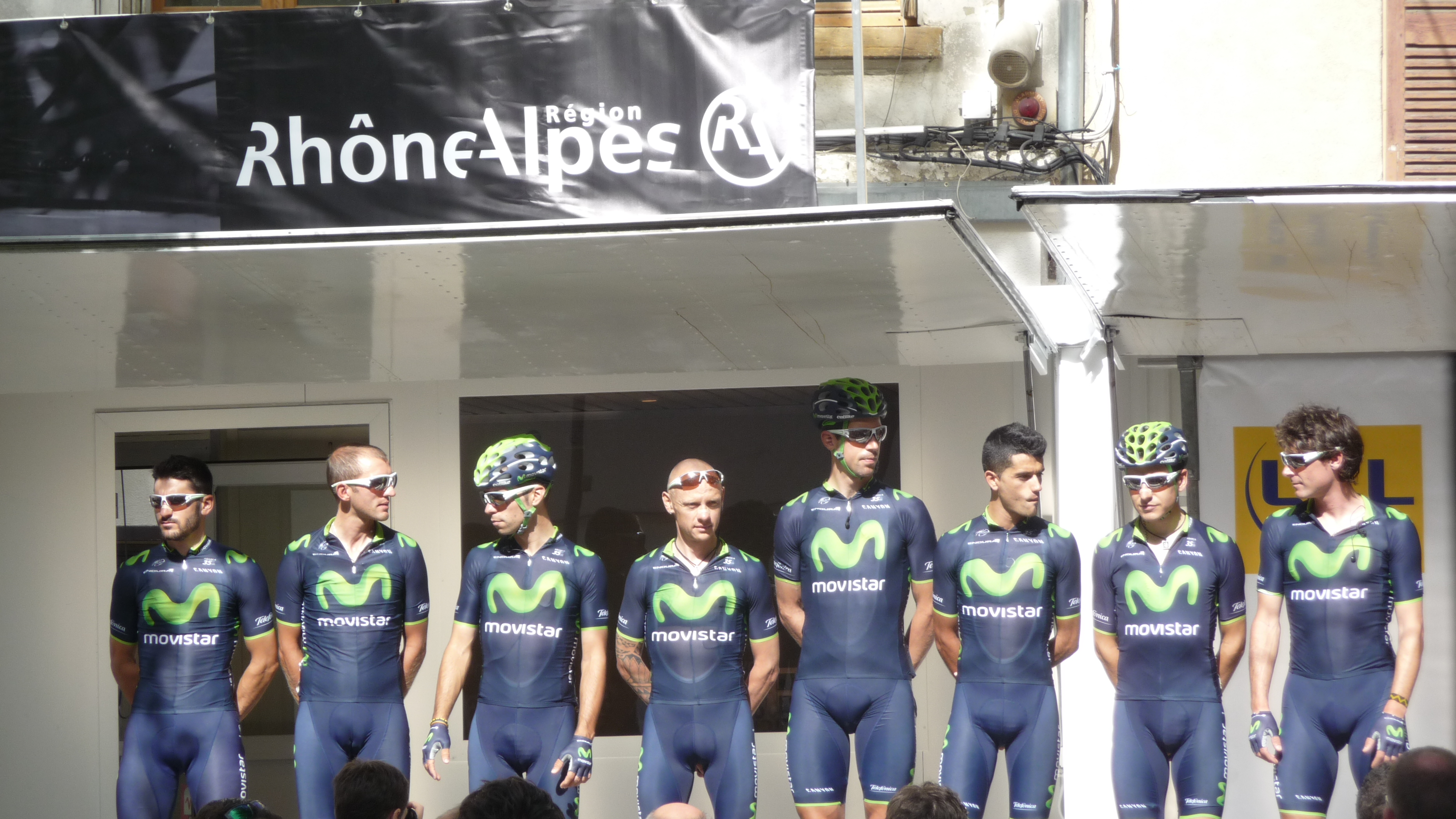 Présentation des équipes du Critérium du Dauphiné 2014 lors du départ de la 2ème étape à Tarare.